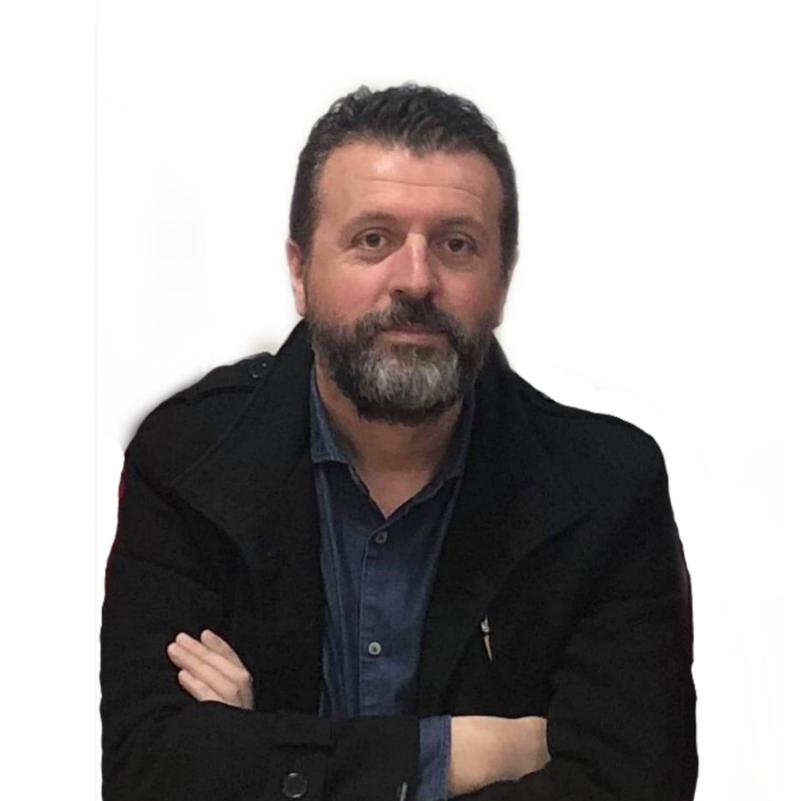 Ag Apolloni është profesor dhe shkrimtar shqiptar